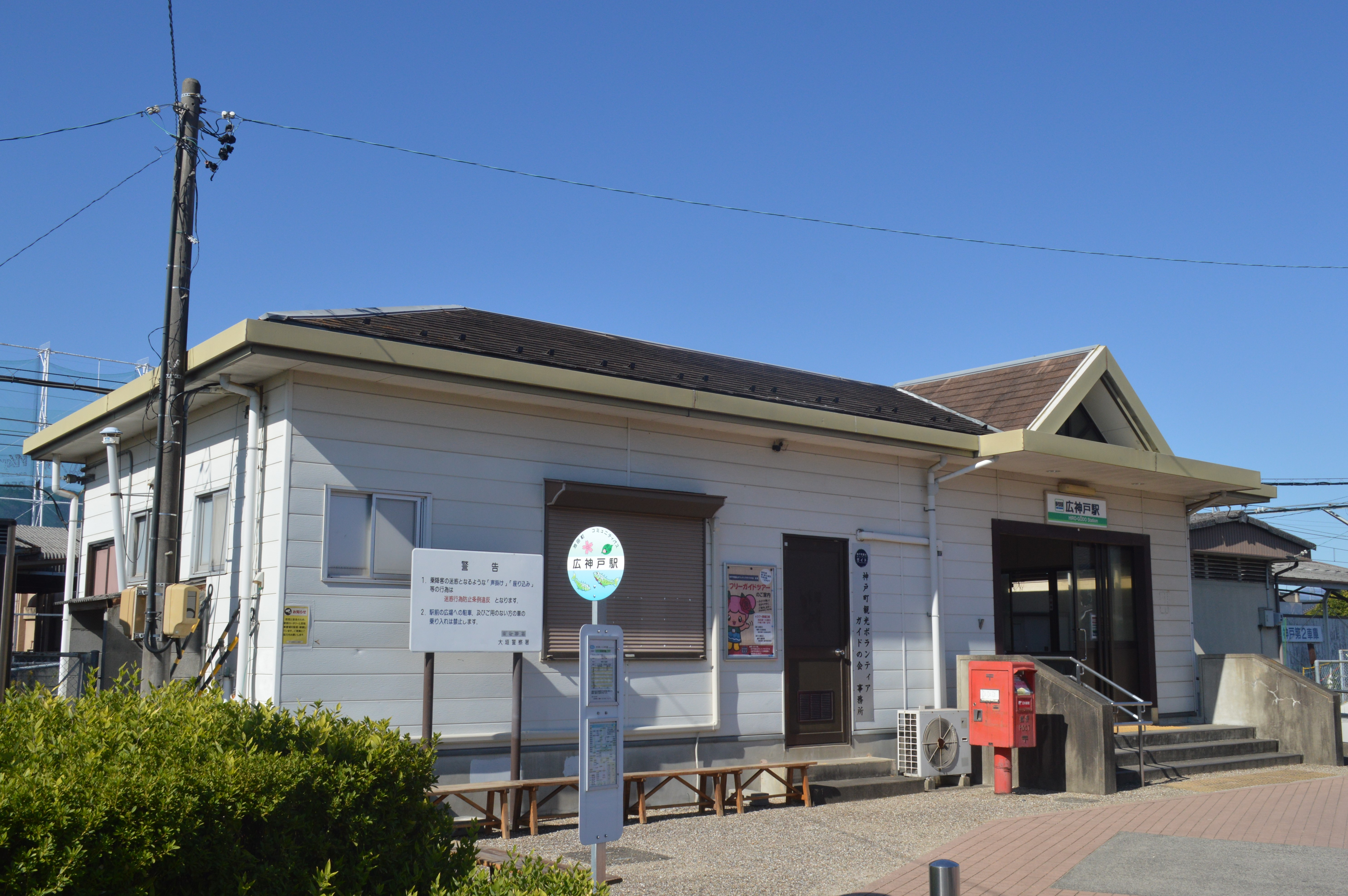 岐阜県安八郡神戸町にある養老鉄道線広神戸駅。